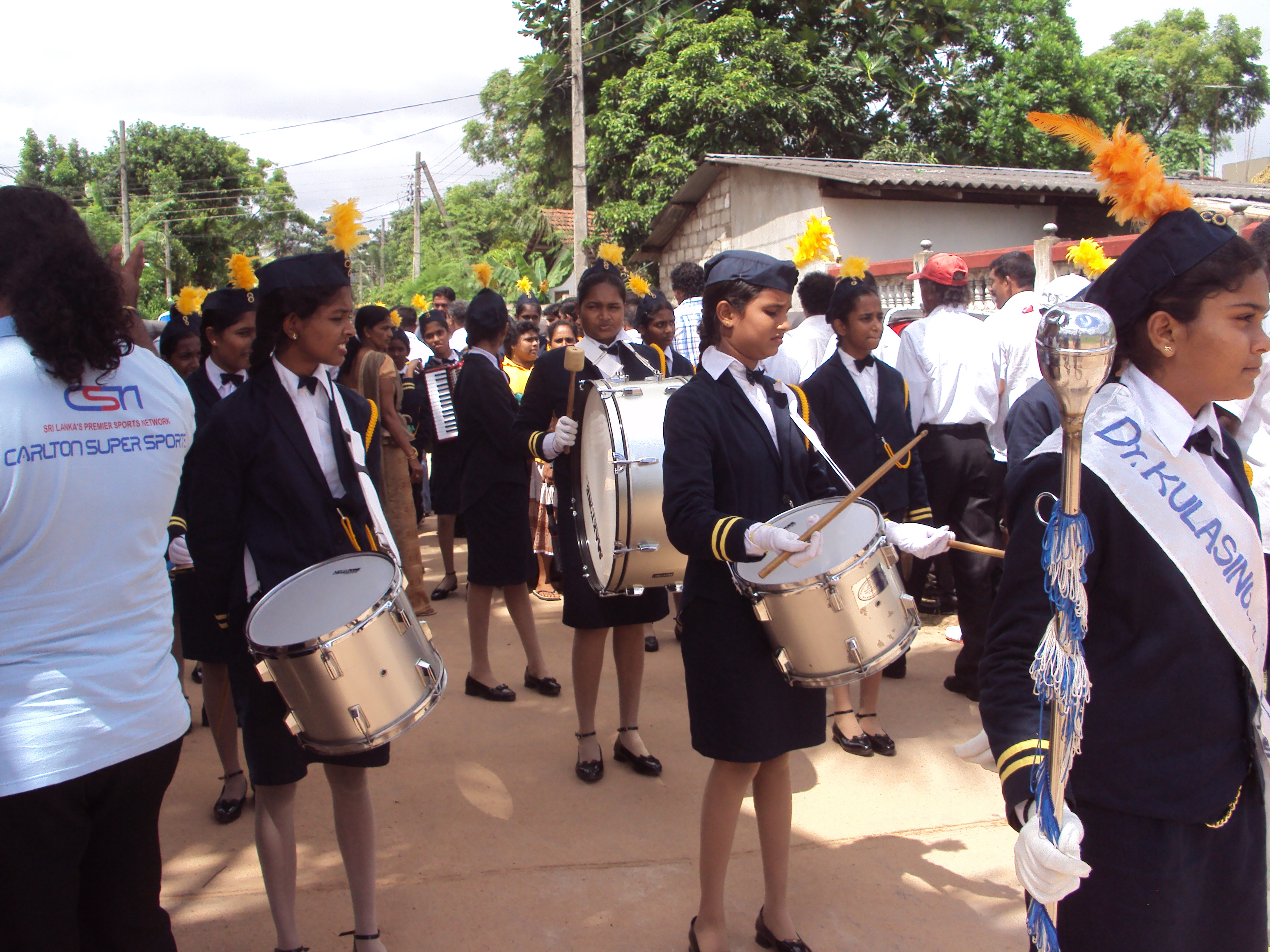 සිංහල: එල්ලේ තරගයක ආරම්භක උත්සවයක්